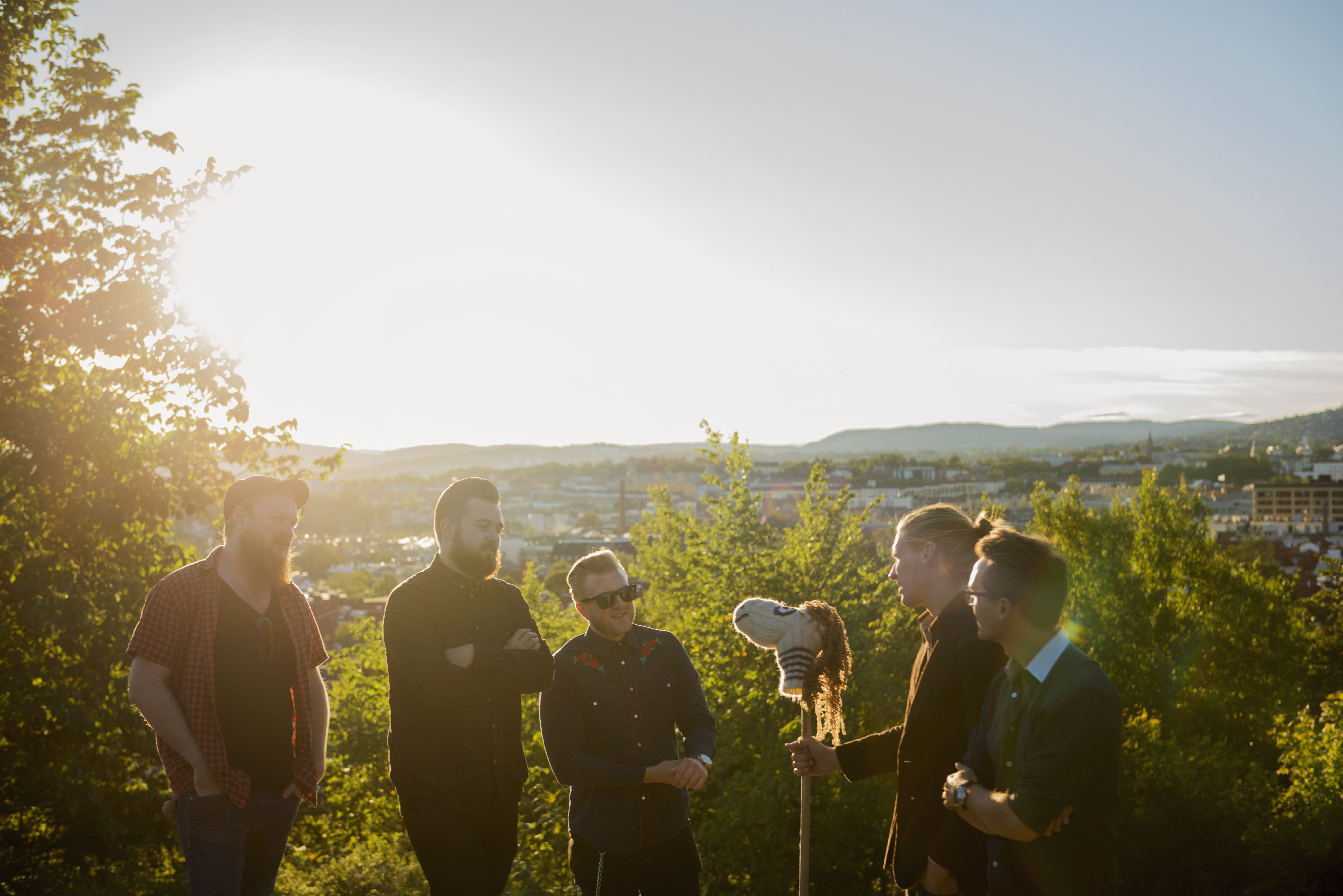 SVARTEPER fotoshoot